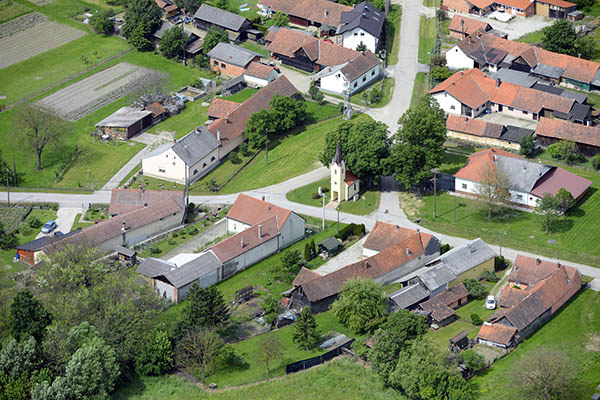 Zsitkóc